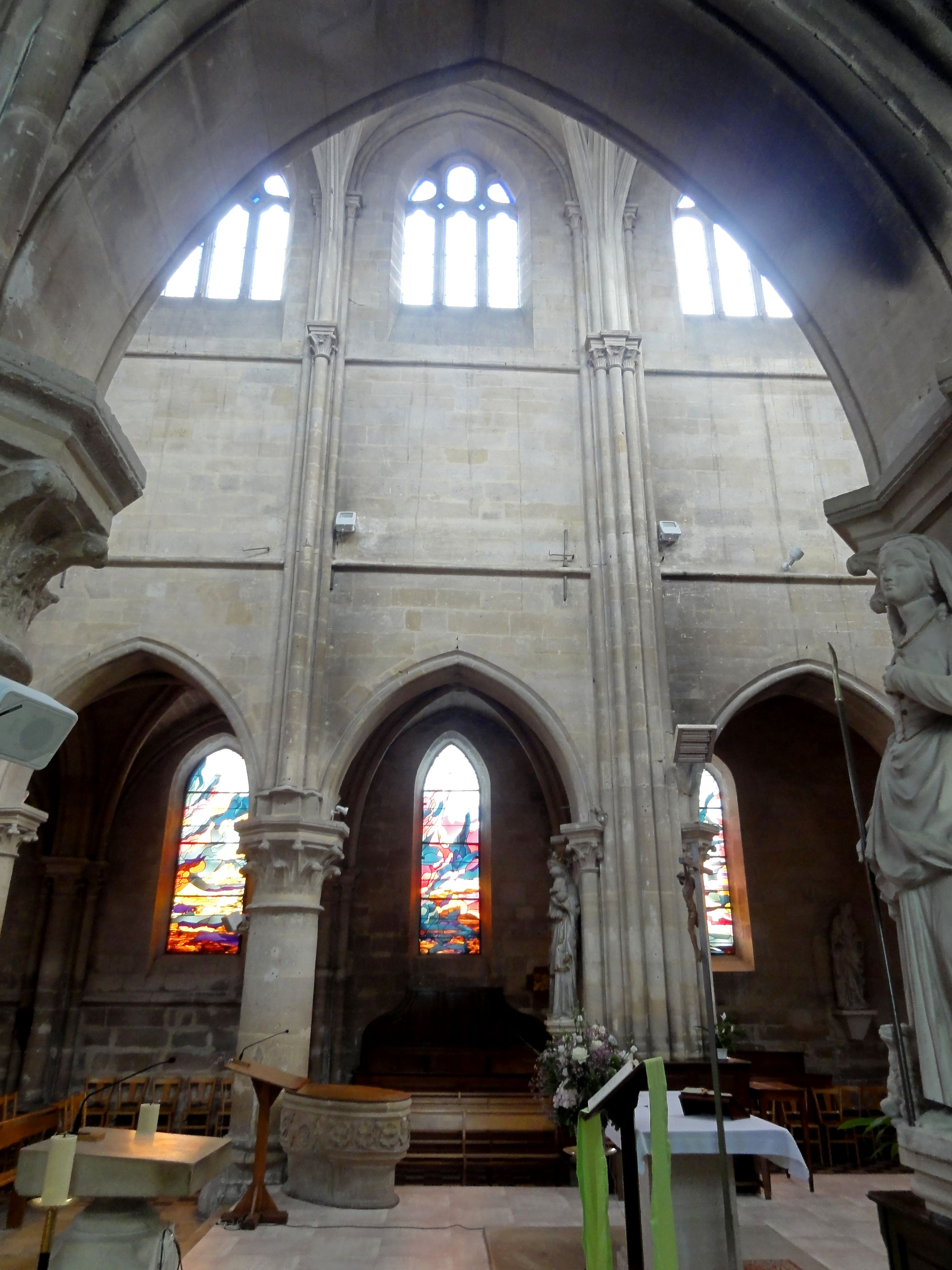 Elévation nord, 4e travée.